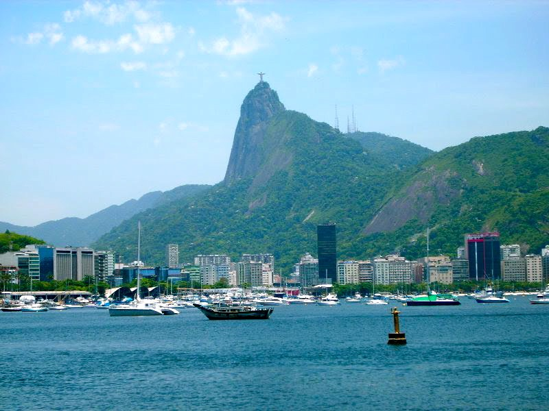 Corcovado visto pela Urca